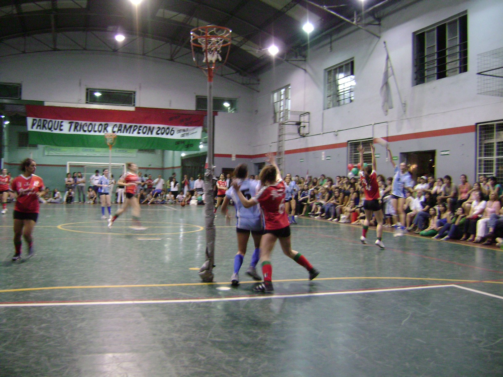 Partido de cestoball en la ciudad de Buenos Aires